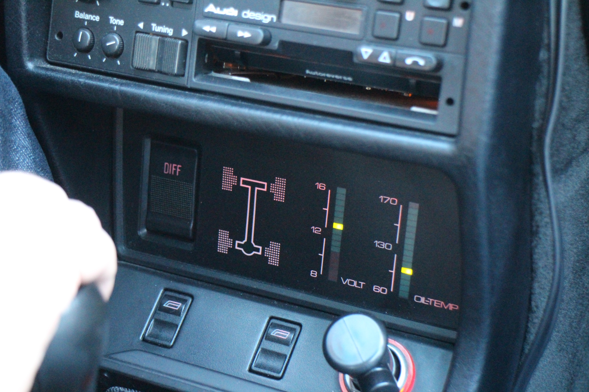 eine Tour durch die schweizer und österreichischen Alpen